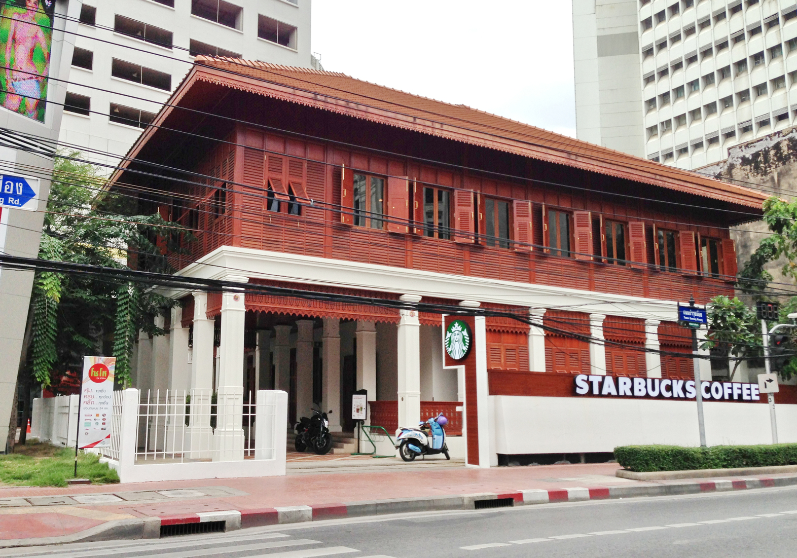 Starbucks coffee, Thanon Bamrom Muang,Khlong Maha nak,Prom Prap sattru Phai, bangkok